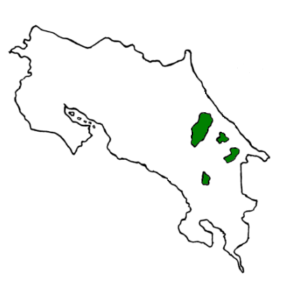 Mapa de Costa Rica con las regiones donde se habla cabécar, lengua indígena.